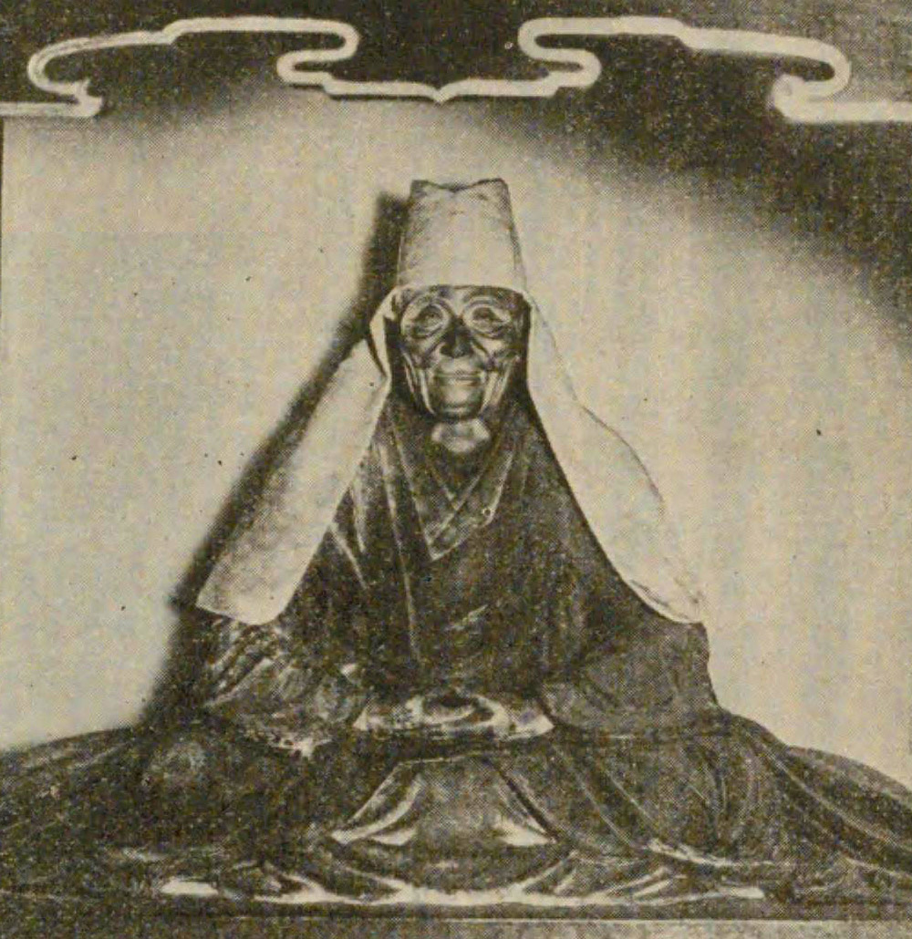 養徳院（池田恒興の母）